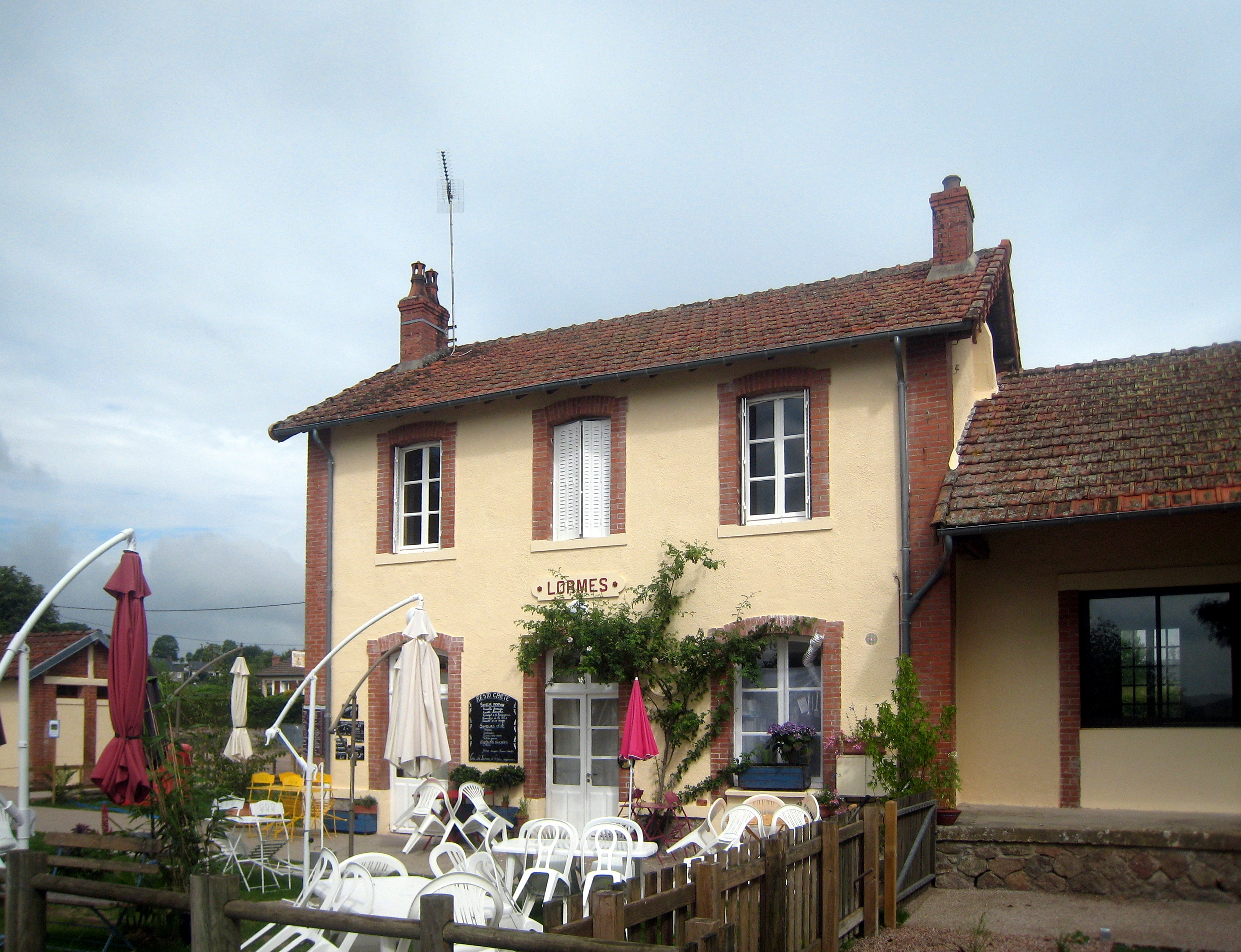 Lormes, l'ancienne gare du tacot du Morvan de Corbigny à Saulieu transformée en restaurant (Nièvre, France).